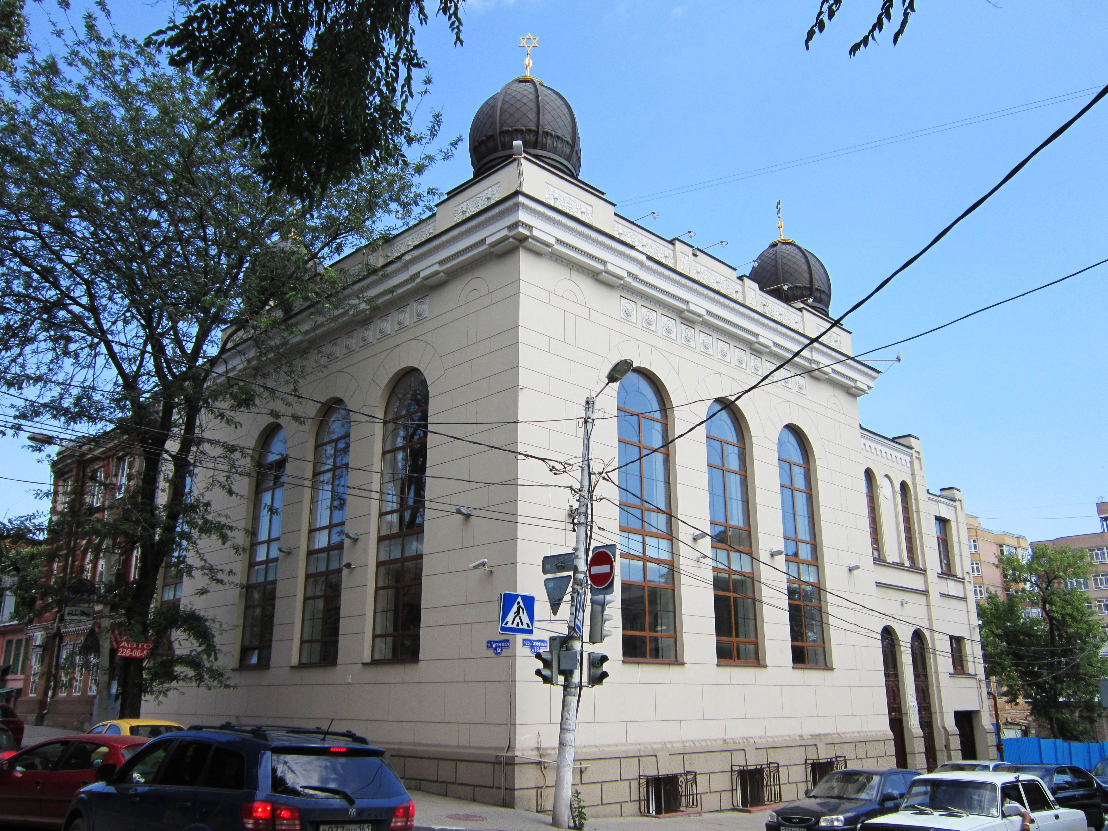 Синагога Ростов-на-Дону